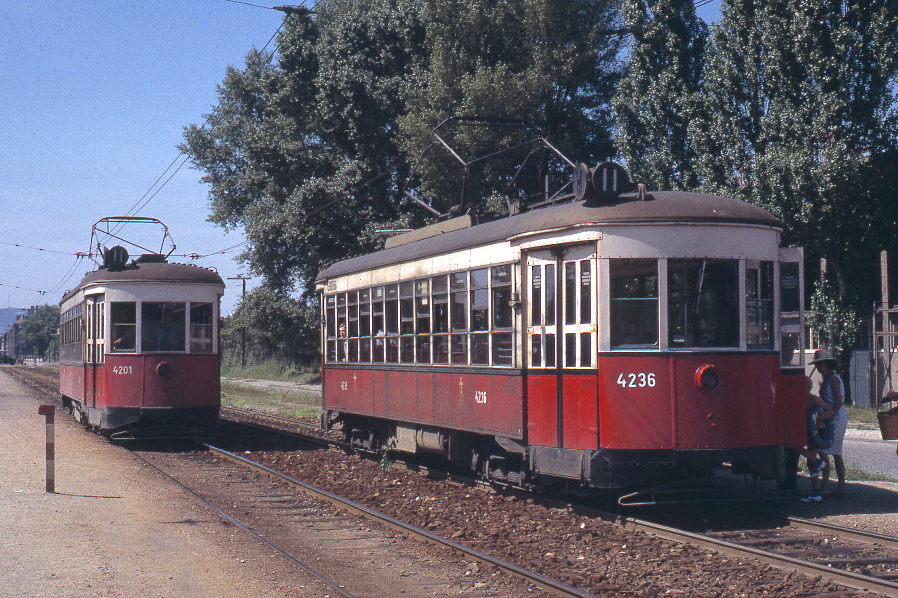 Motrice ex New-York trop large pour rouler ailleurs que sur cette ligne au bord du Danube.